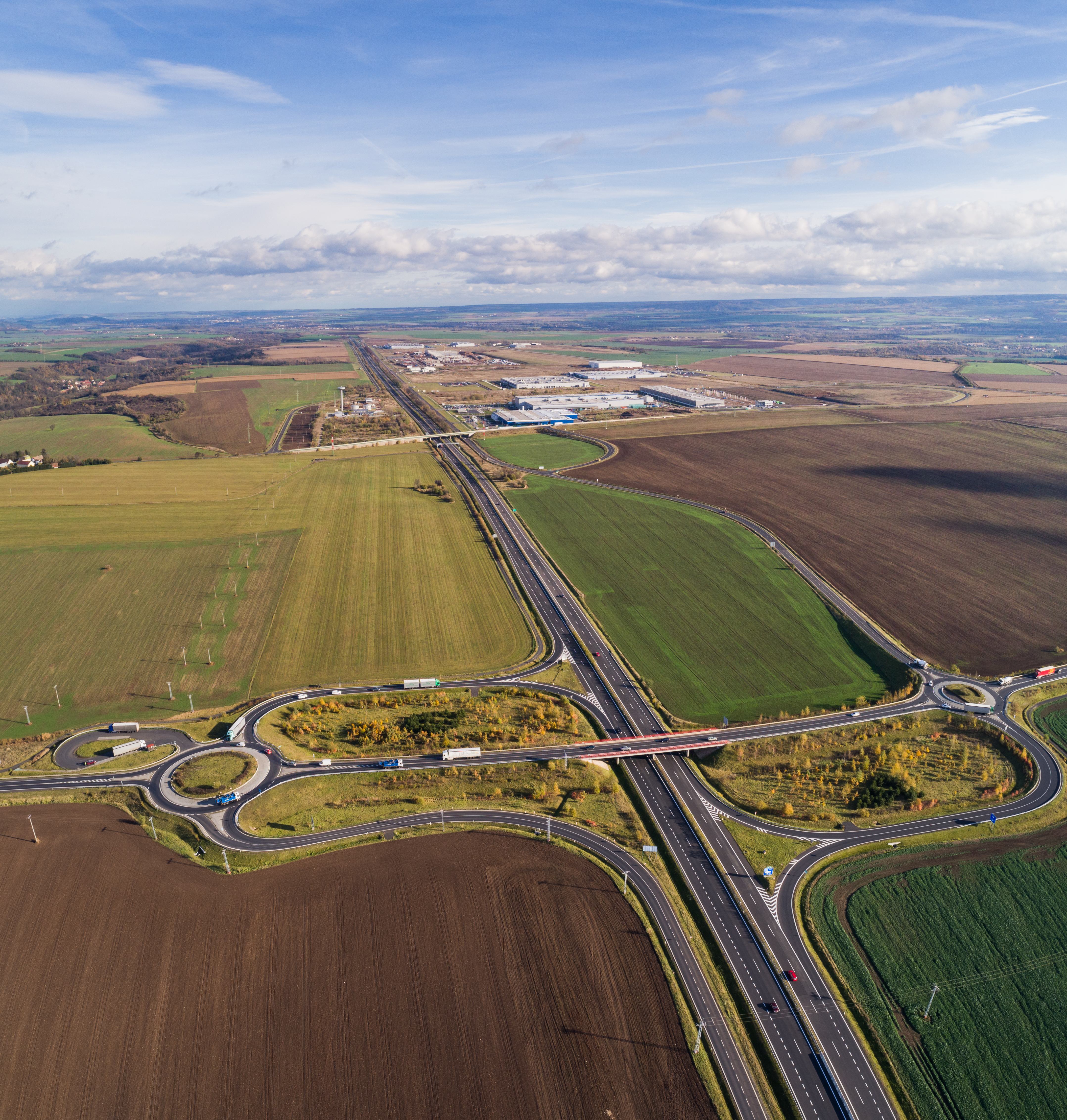 Triangle od CV